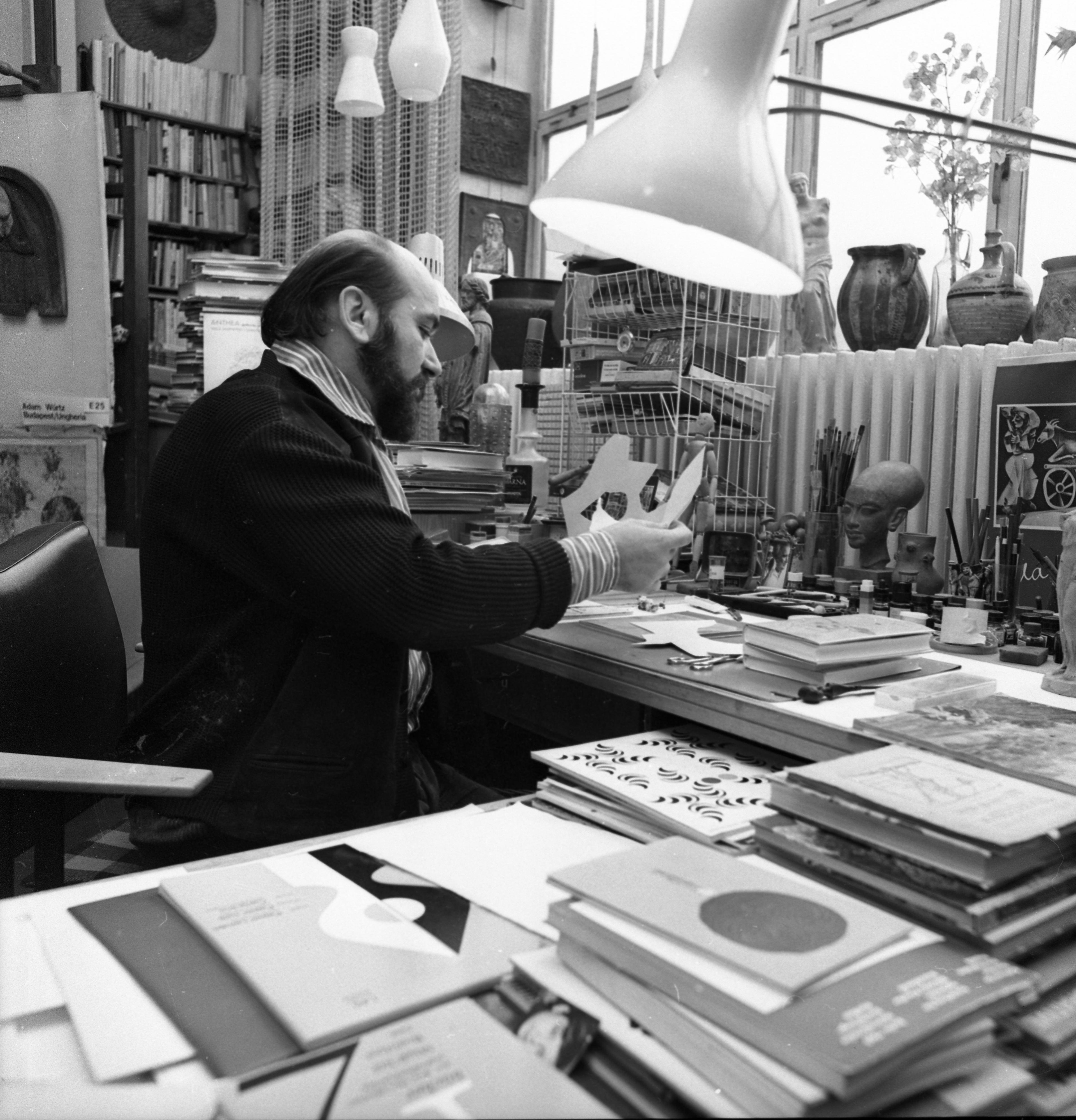 Máglya köz 4. Würtz Ádám grafikus lakása. Location: Hungary, Budapest XIII. Tags: Budapest Title: Máglya köz 4. Würtz Ádám grafikus lakása.